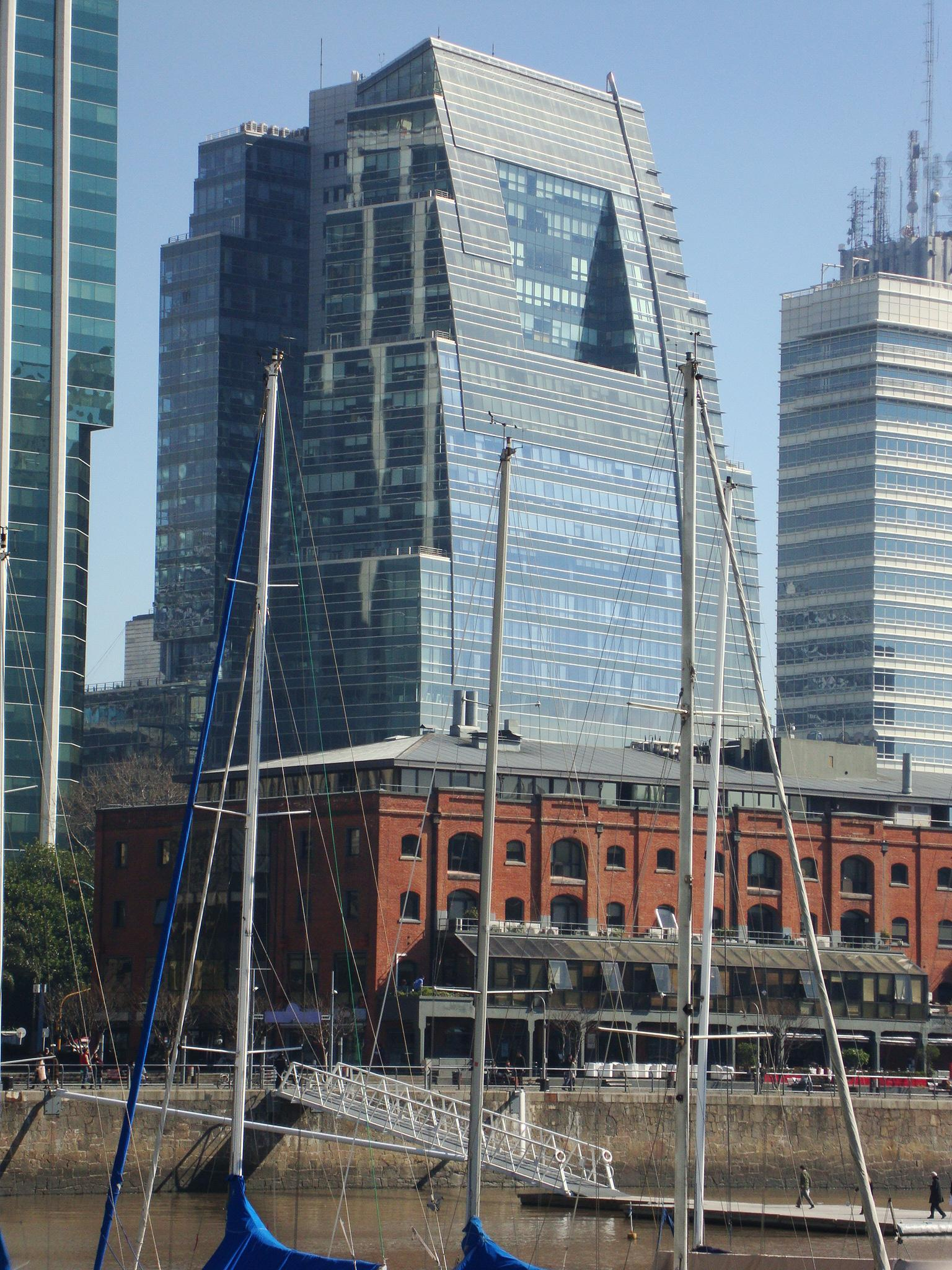 Vista del Bouchard Plaza, desde el malecón este del Dique 4 de Puerto Madero. Buenos Aires, Argentina.